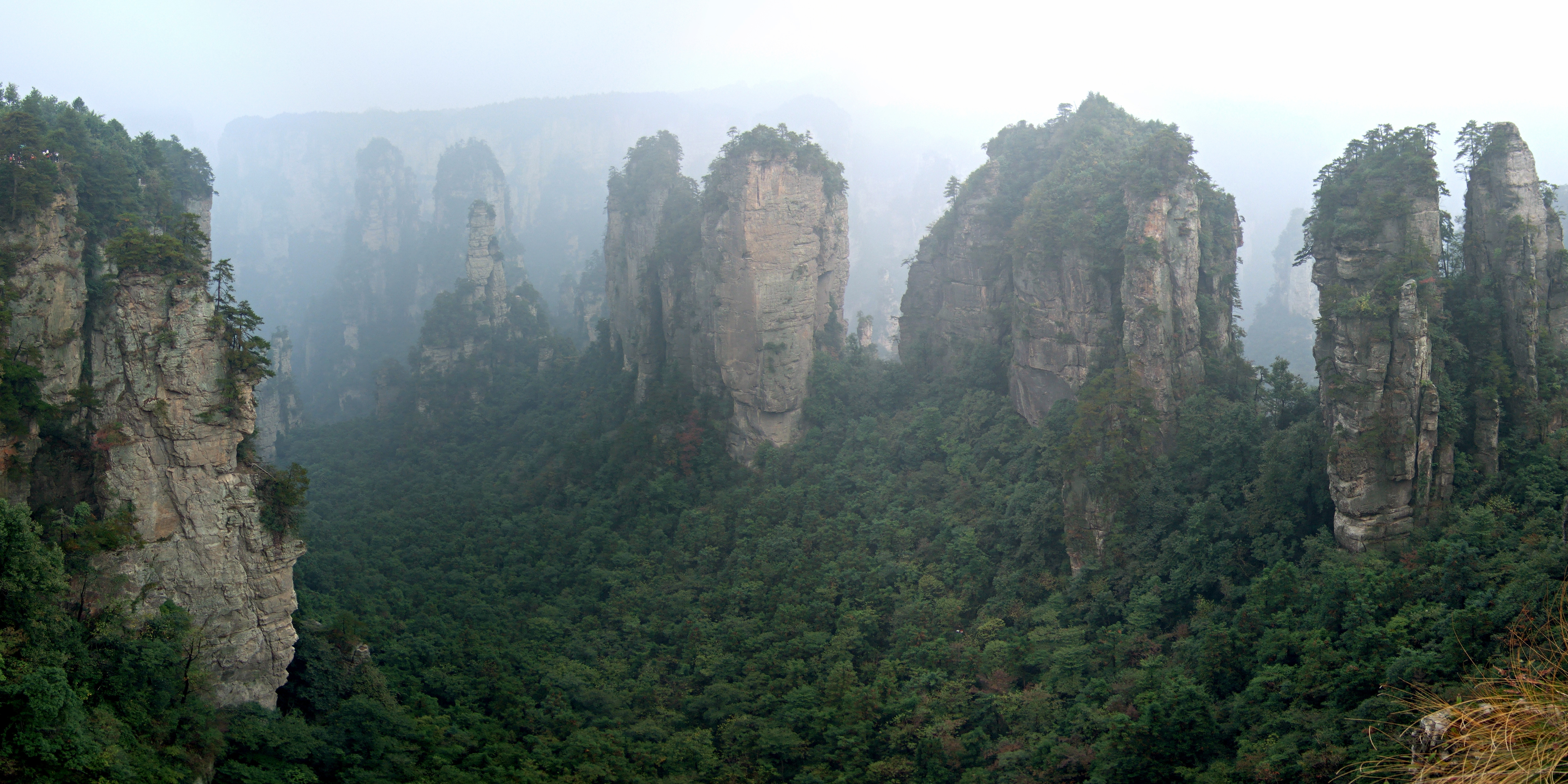 Wulingyuan, Zhangjiajie, Hunan Prov., China.